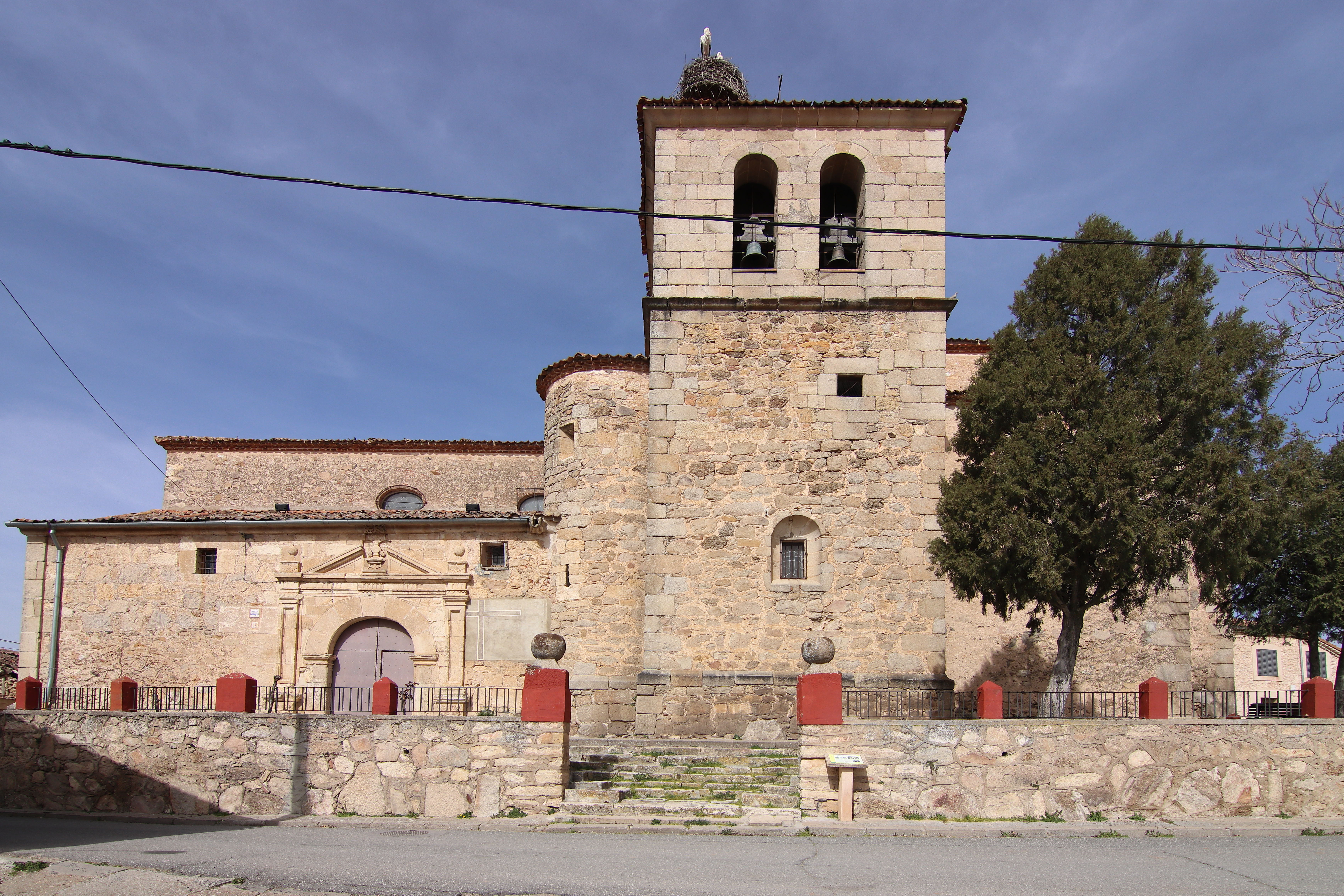 Iglesia de Nuestra Señora de la Asunción, Losana de Pirón, fachada principal, sur